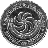 1-50 Tetri backside